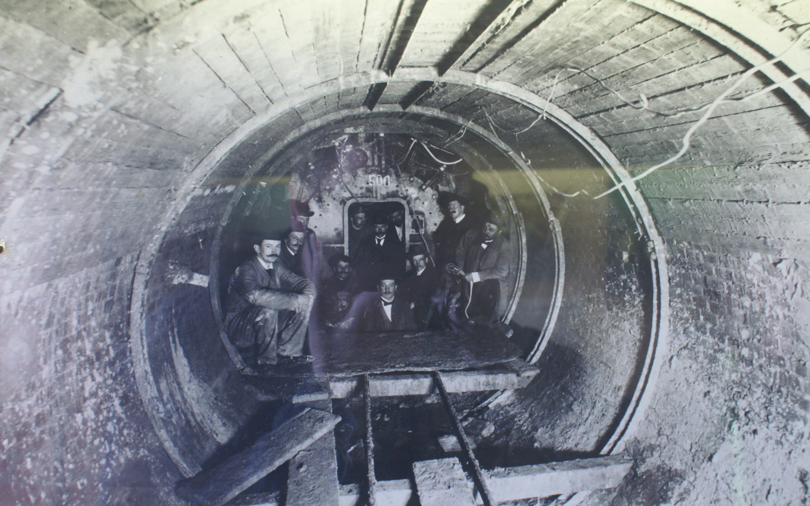 Hamburger Stadtdentwässerung Bau der Hamburger Stadtentwässerung 1879